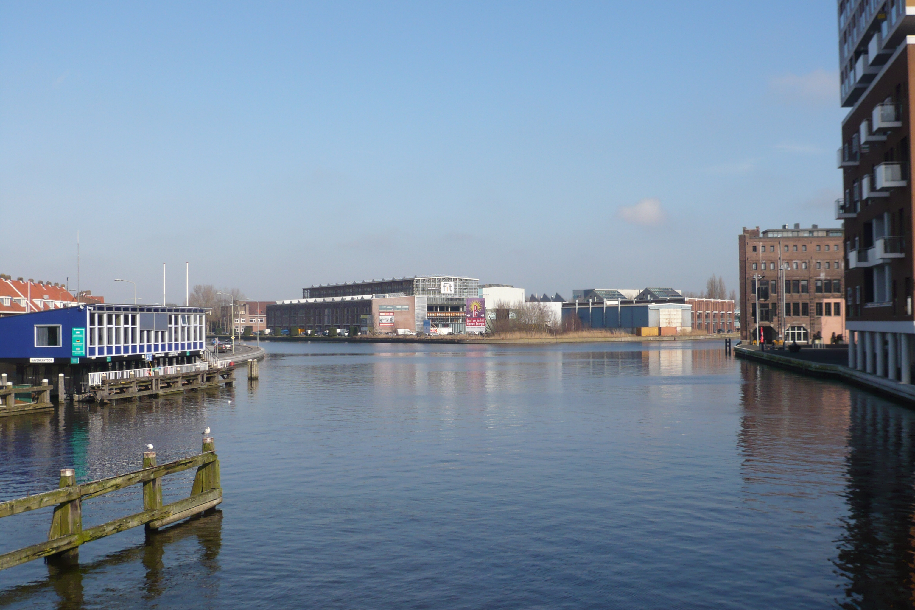 Spaarne river. View north from bridge - left Havenkantoor, middle - Figee, right Droste